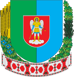 Герб Овруцького району